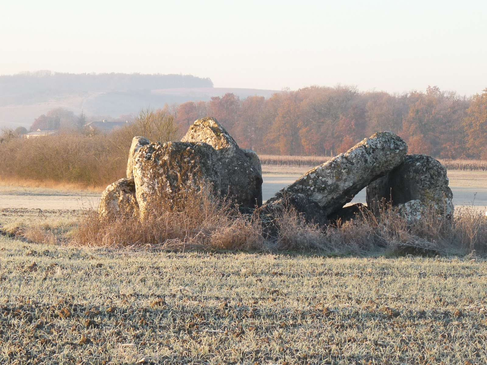 dolmen de St-Même-les-Carrières, Charente, France